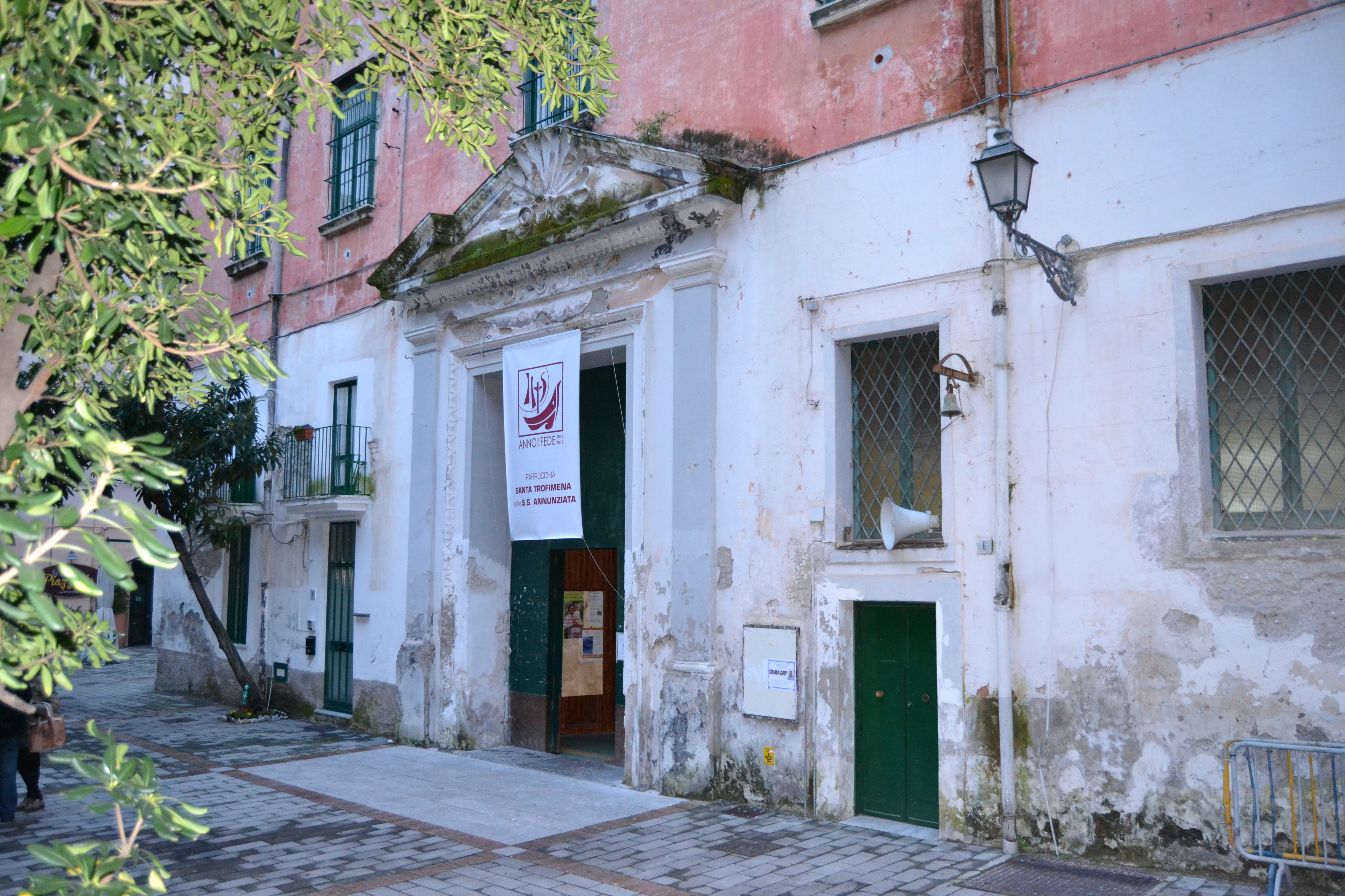 Ingresso della chiesa di Sant'Anna al Porto, Marzo 2013